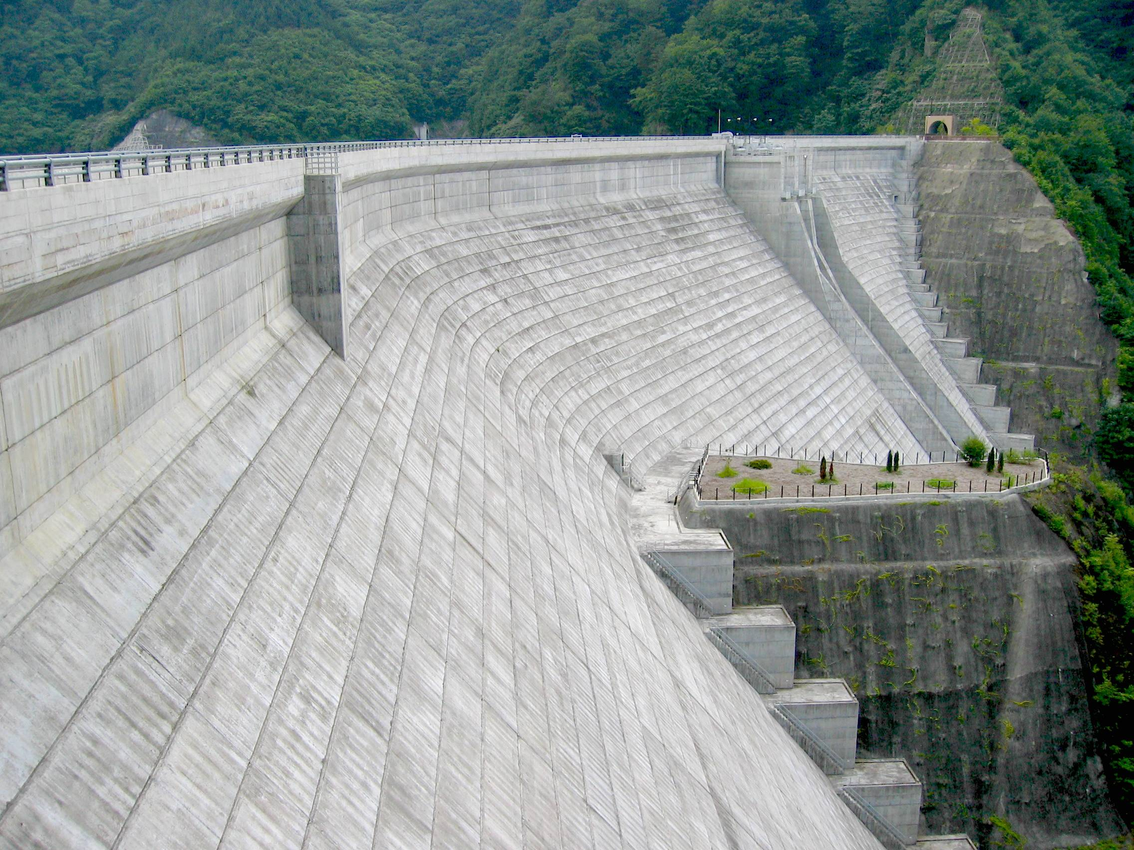 Ueno Dam (上野ダム) is a dam in Gunma, Japan.